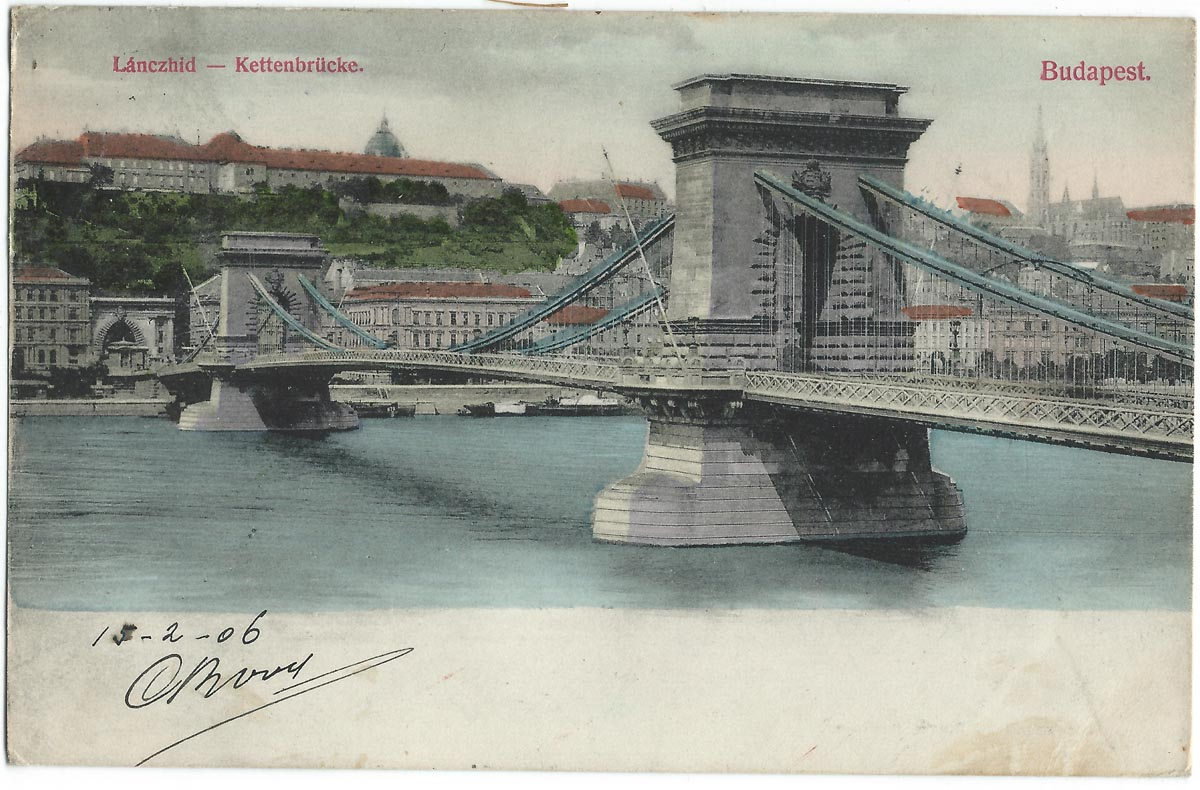 Vue de Budapest au début du XXe siècle.